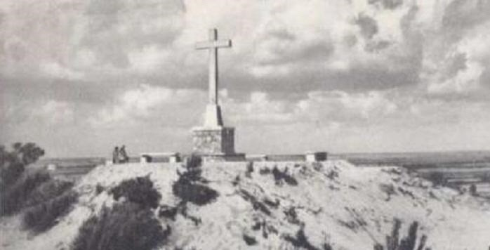 Westpreußenkreuz an der Weichel bei Weißenberg